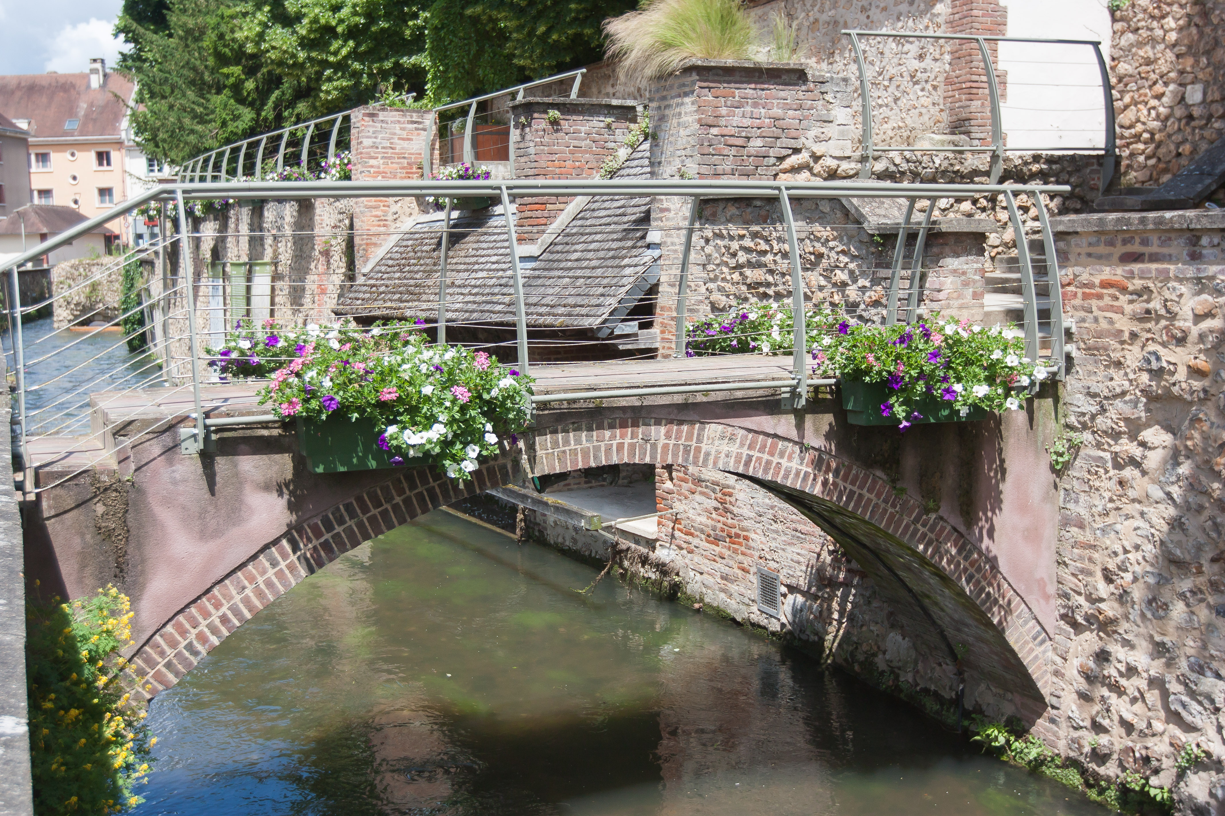 La rivière Iton dans Évreux // Évreux - Eure - France